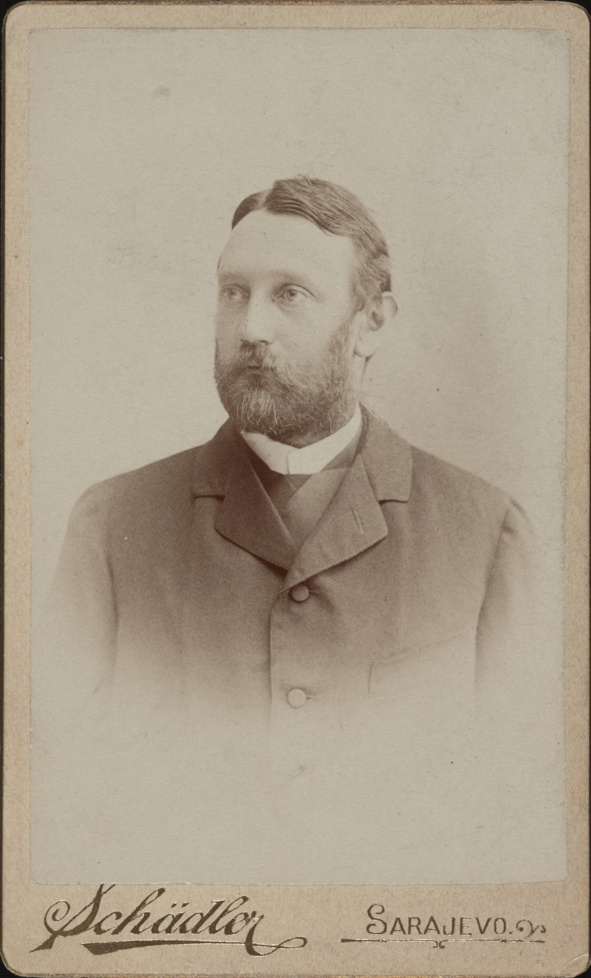 Othmar Reiser or Otmar Rajzer (21 December 1861 – 31 March 1936, Pickern)